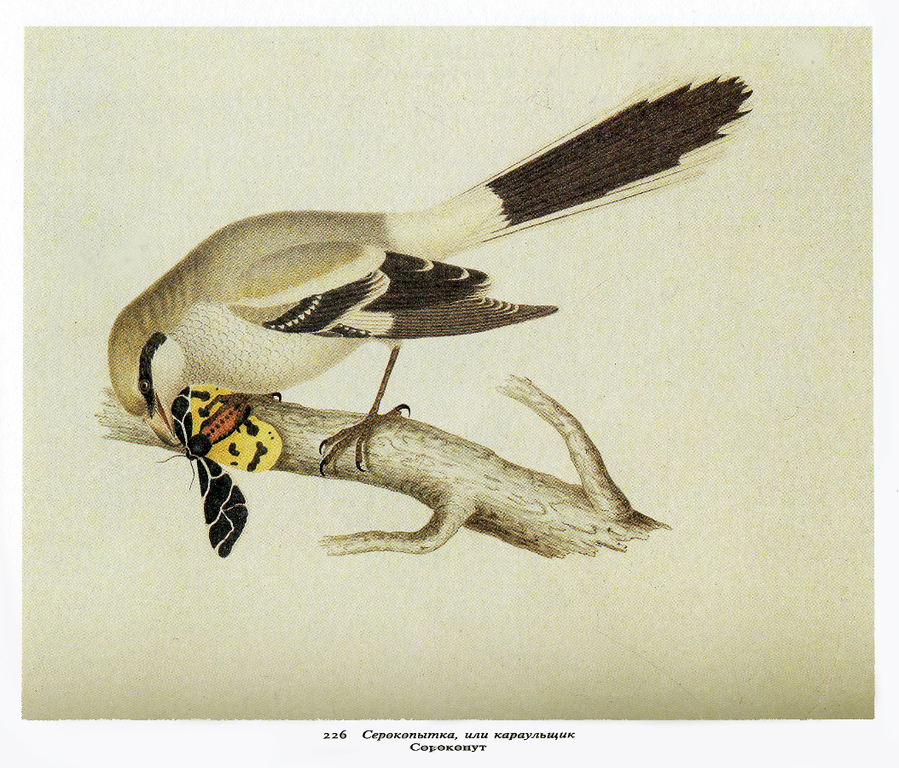 Серокопытка, или караульщик